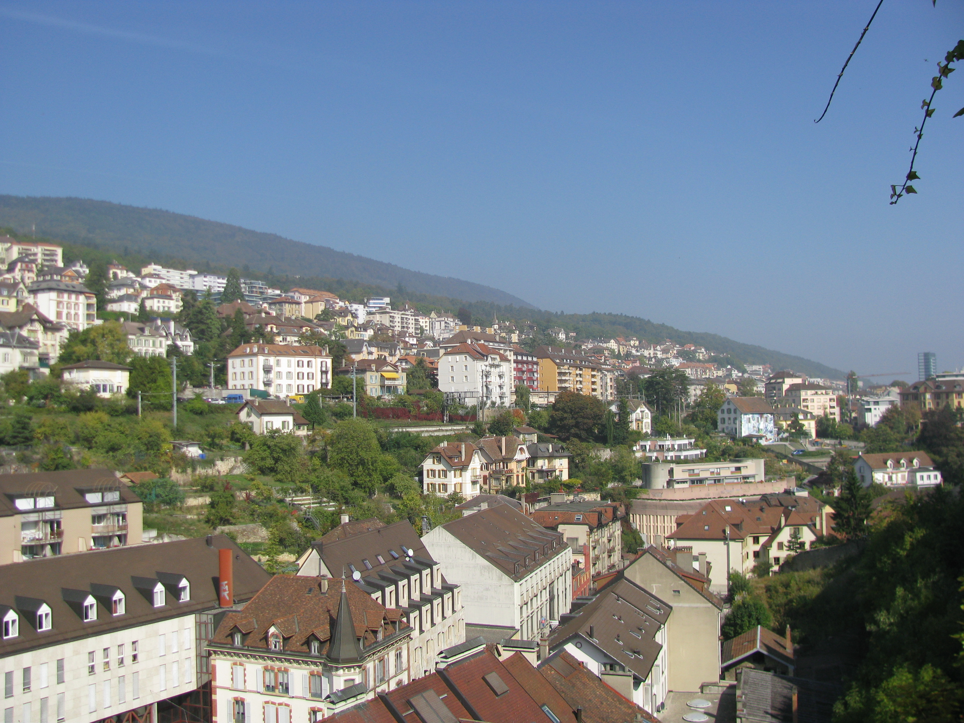 Невшатель, Швейцарія